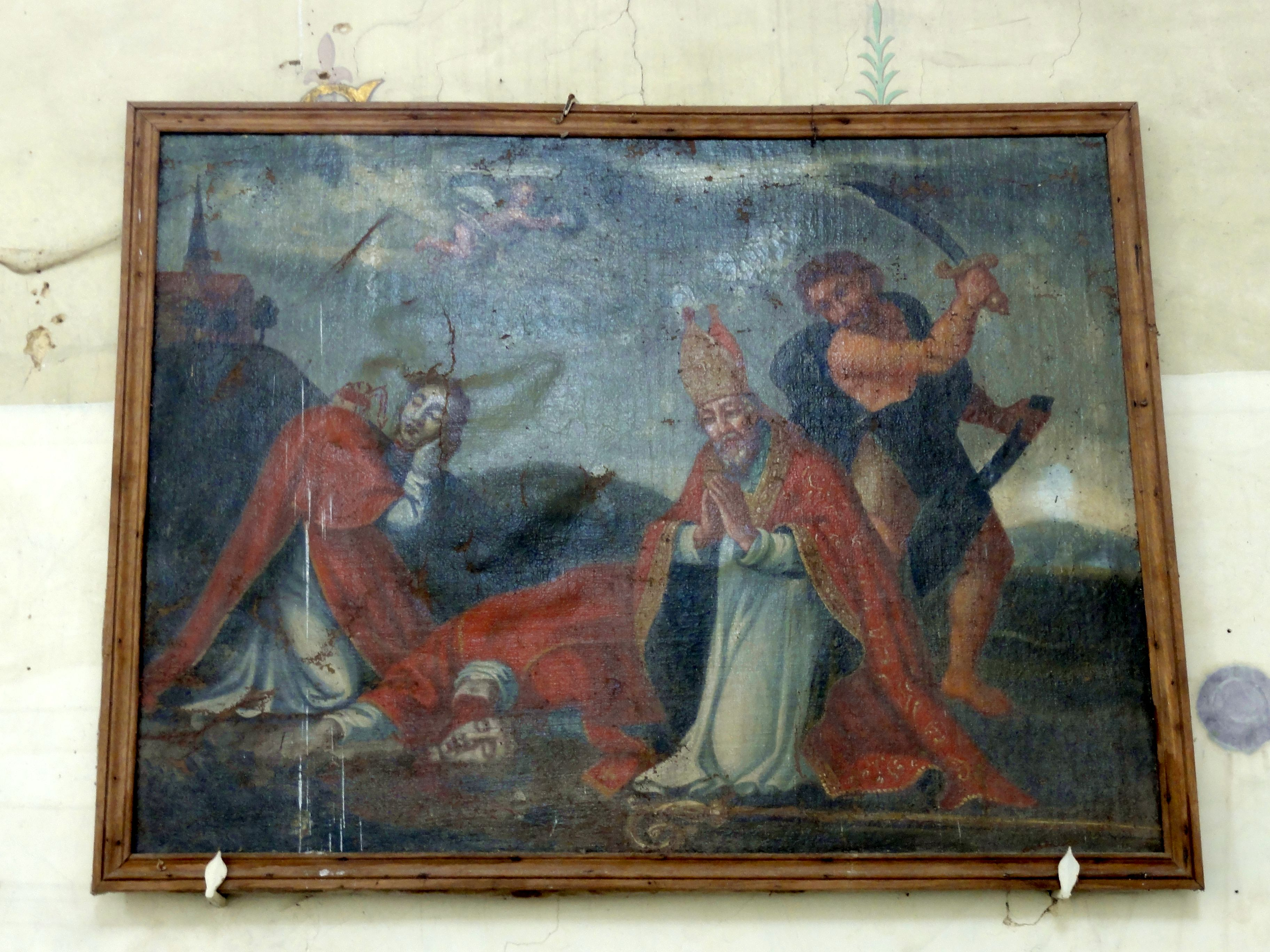 Tableau - martyr de saint Lucien.